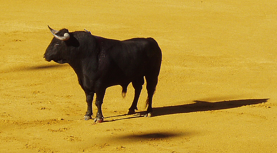 Toro en la plaza de El Puerto de Santa María, España.